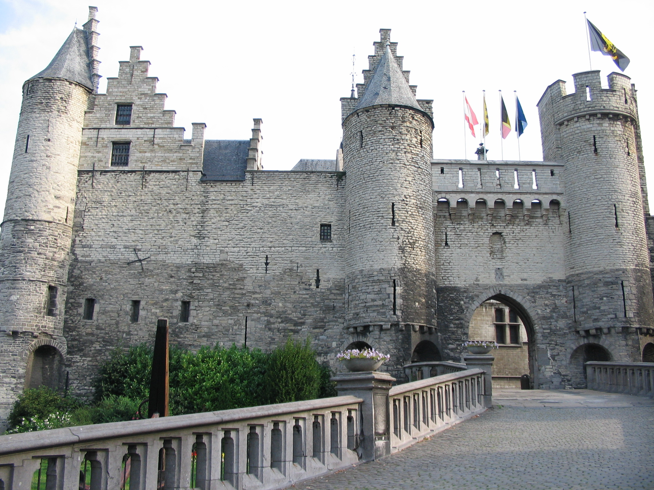 Bordant l'Escaut en remontant vers le port, le château du Steen (Het Steen) à Anvers, Belgique.